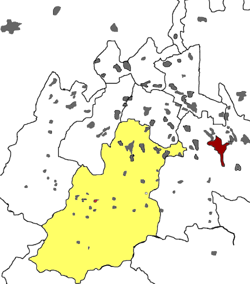 Ирон: Мызуры посёлок.